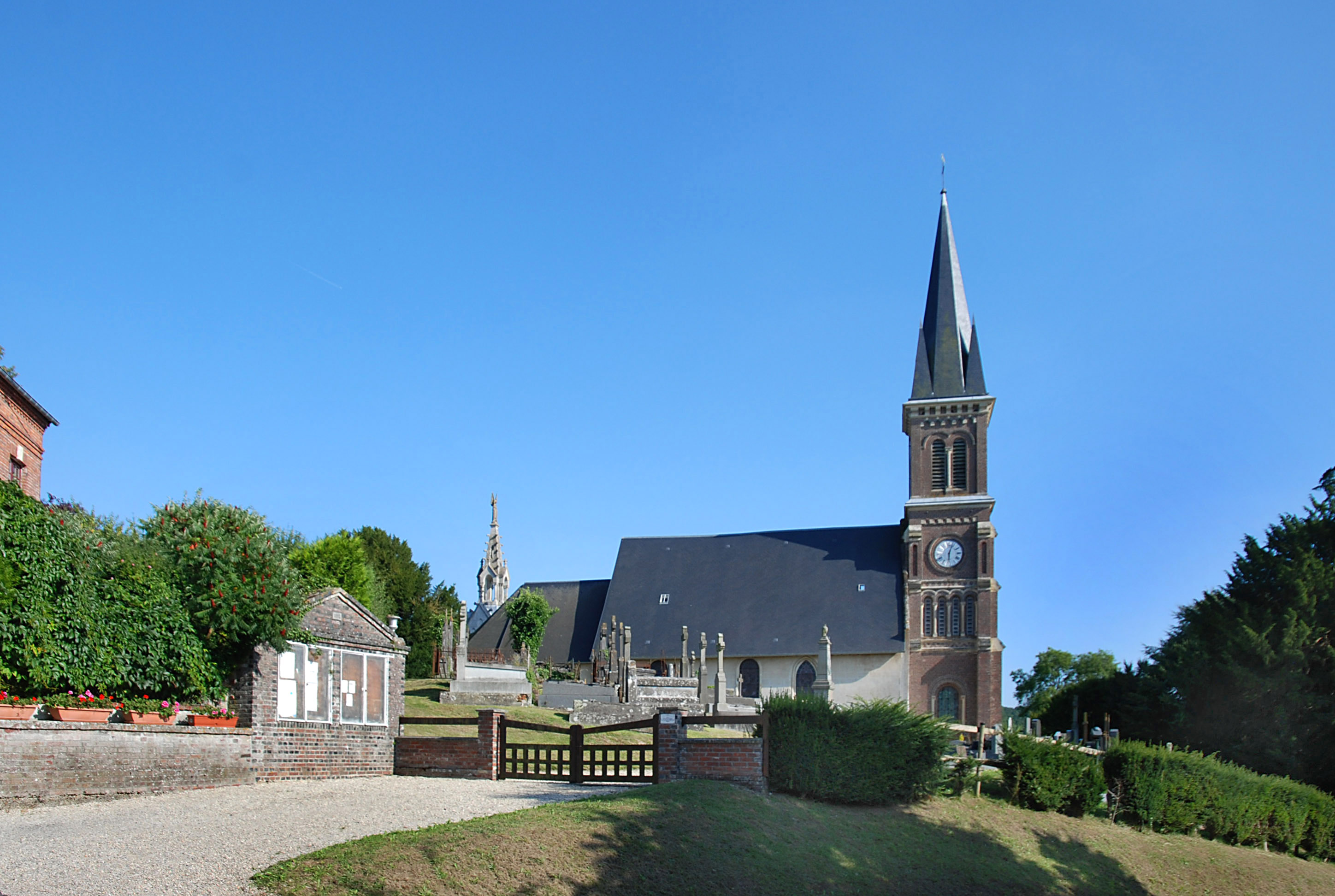 Lisores (Calvados)